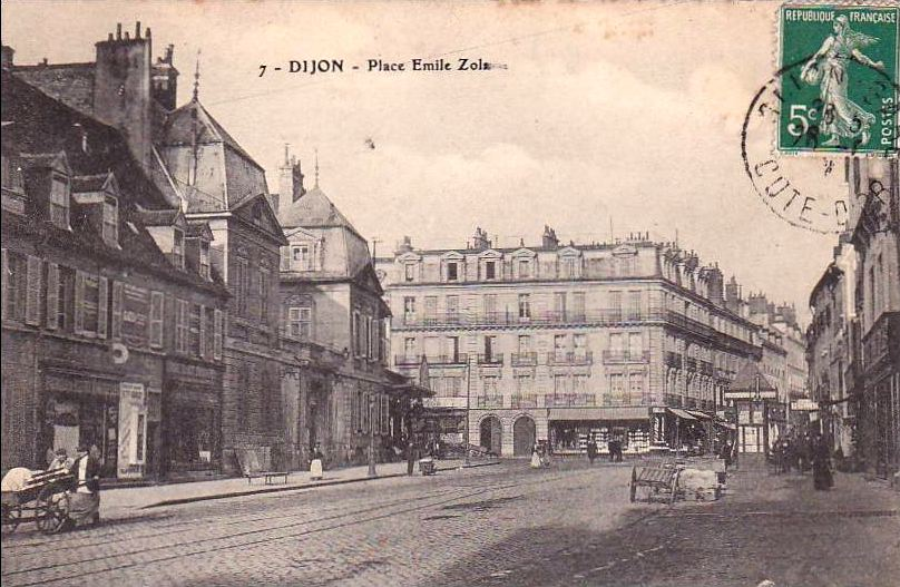 Carte postale ancienne DIJON - Place Bossuet anciennement Émile Zola